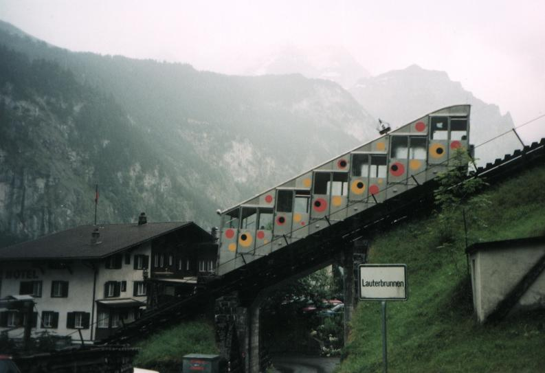 Description